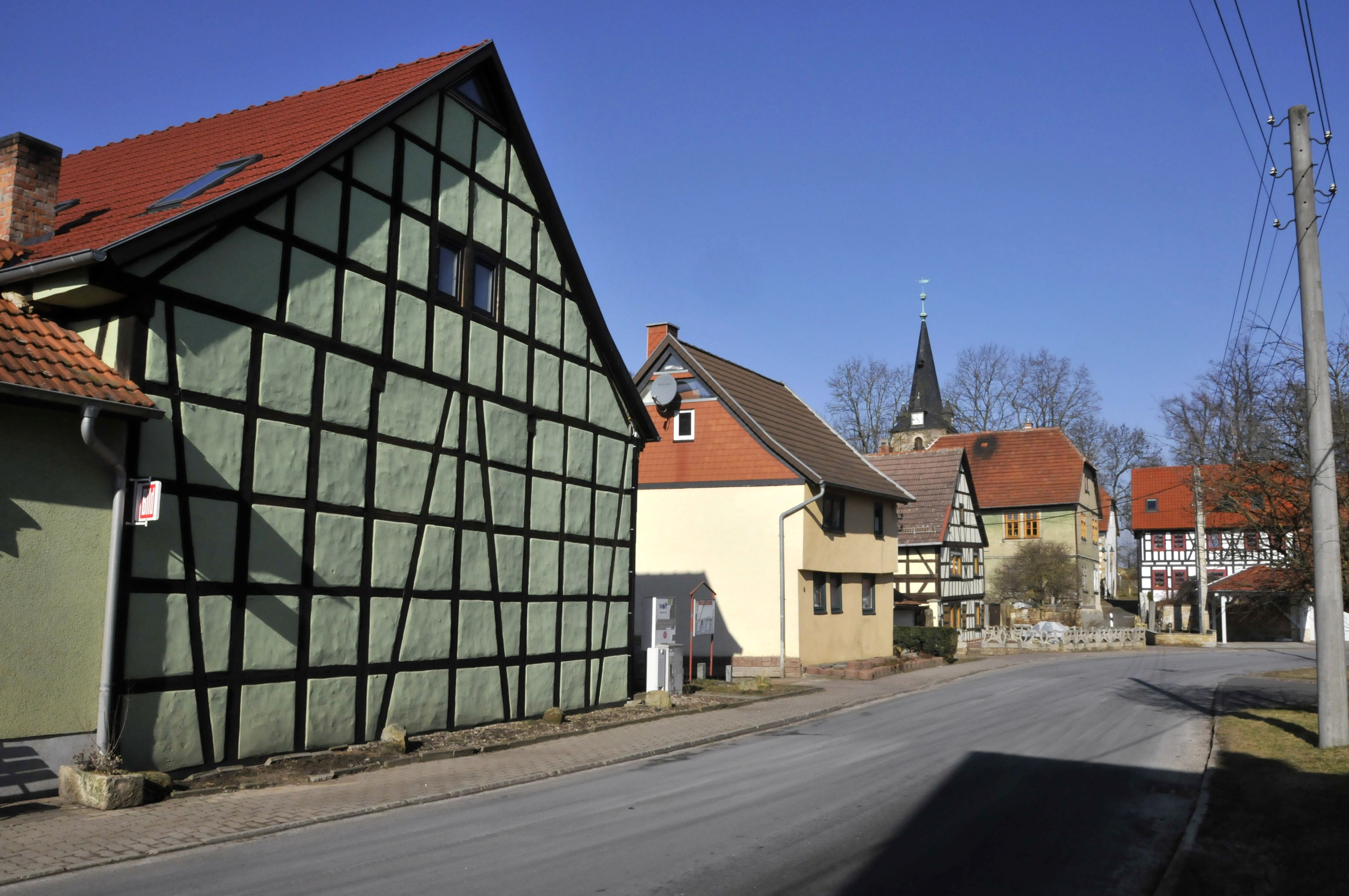 Cobstädt, Dorfstraße